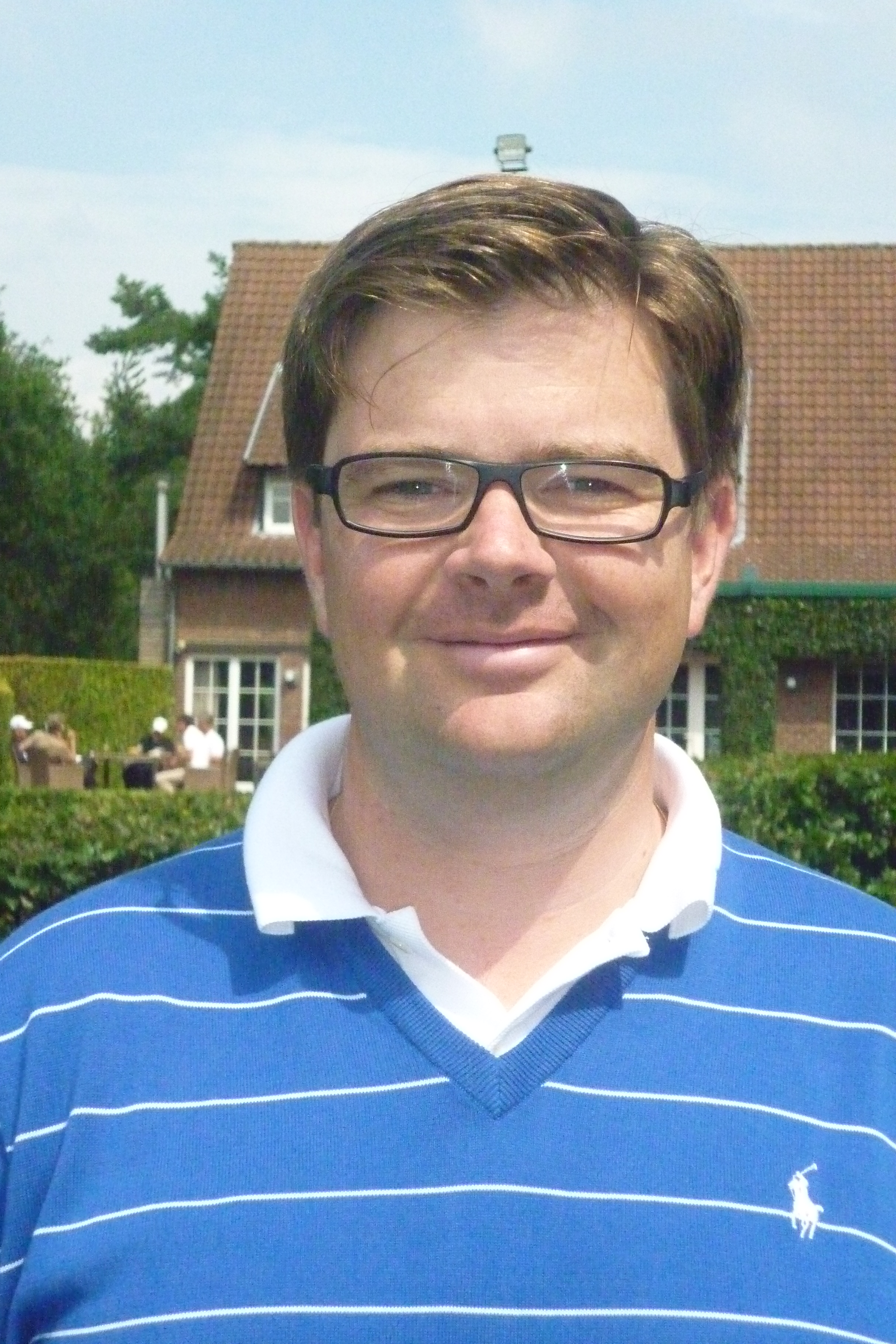 Arnaud Beaupain